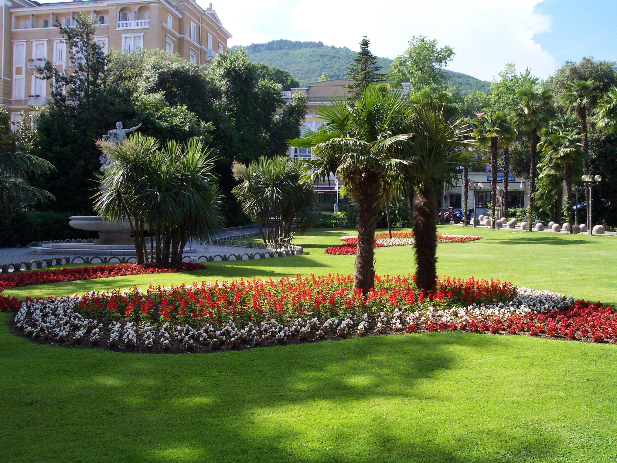 Eine Parkanlage in Opatija